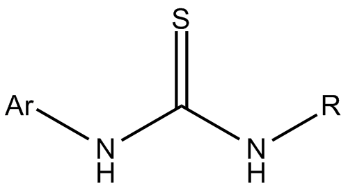 schemat ogólny katalizatora tiomocznikowego